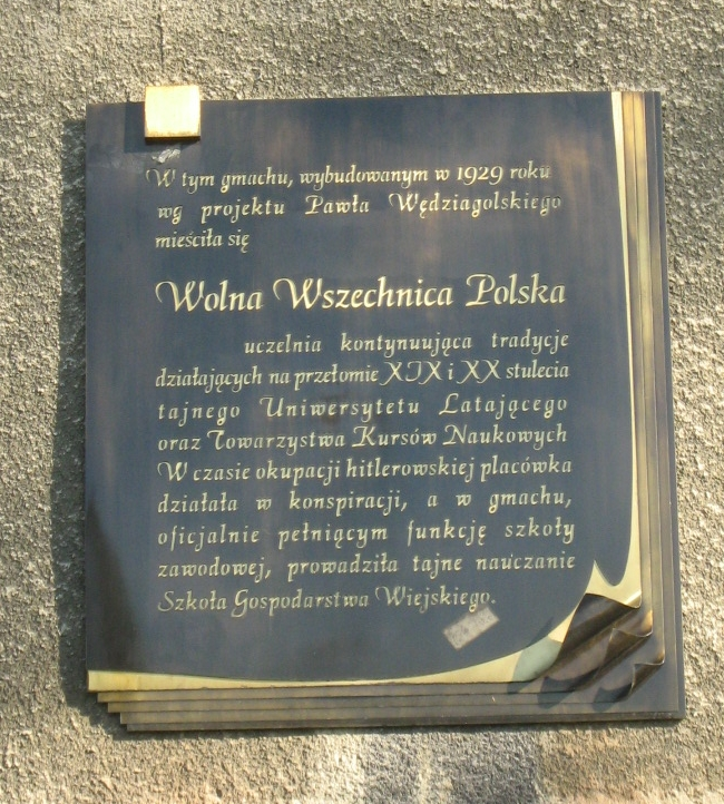 Tablica na gmachu Wolnej Wszechnicy. Ulica Banacha 2 w Warszawie.